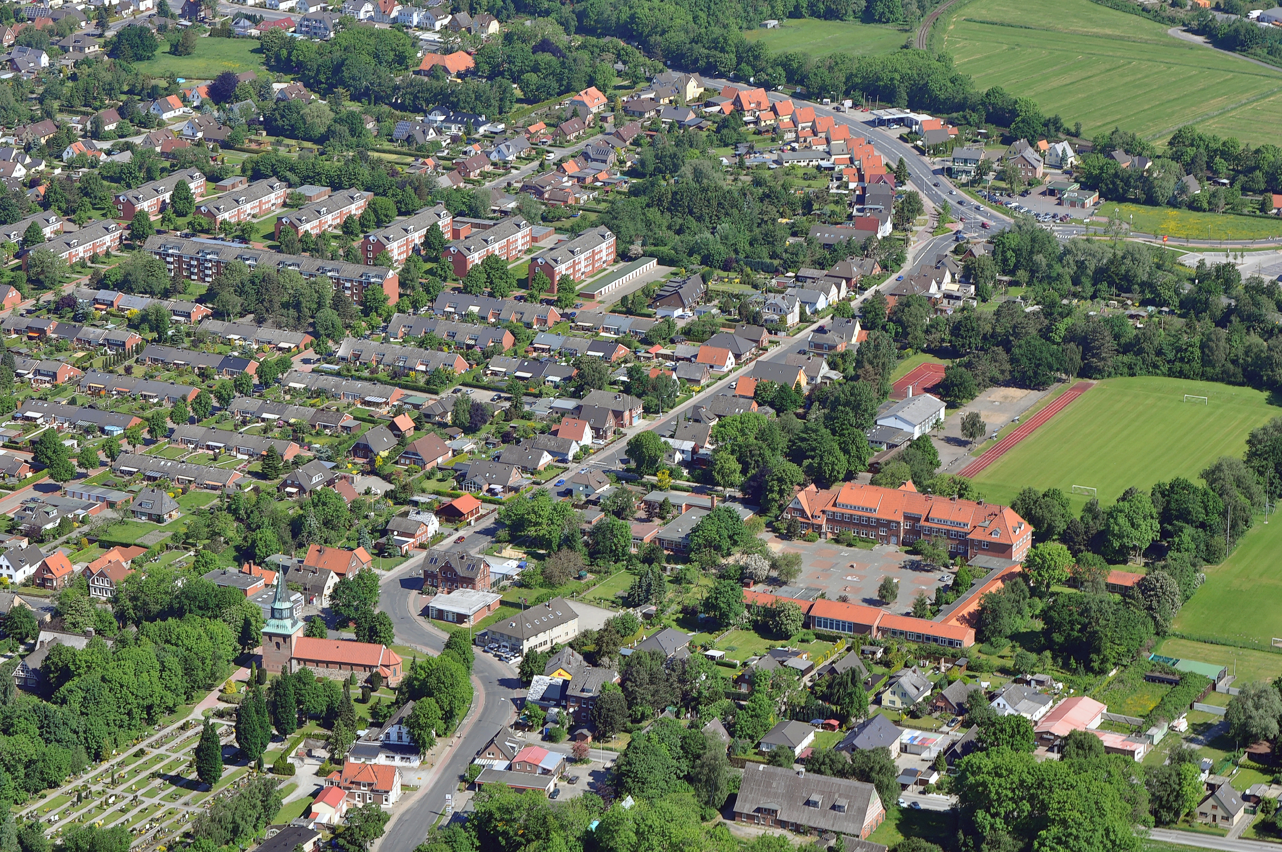 Luftbilder von der Nordseeküste 2012-05